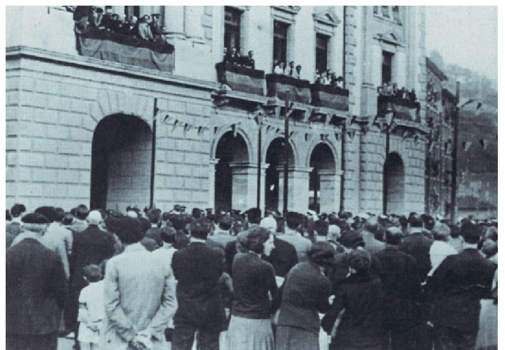 Errepublikaren aldarrikatzea Eibarko udaletxean (Gipuzkoa), 1931ko apirilaren 14an.